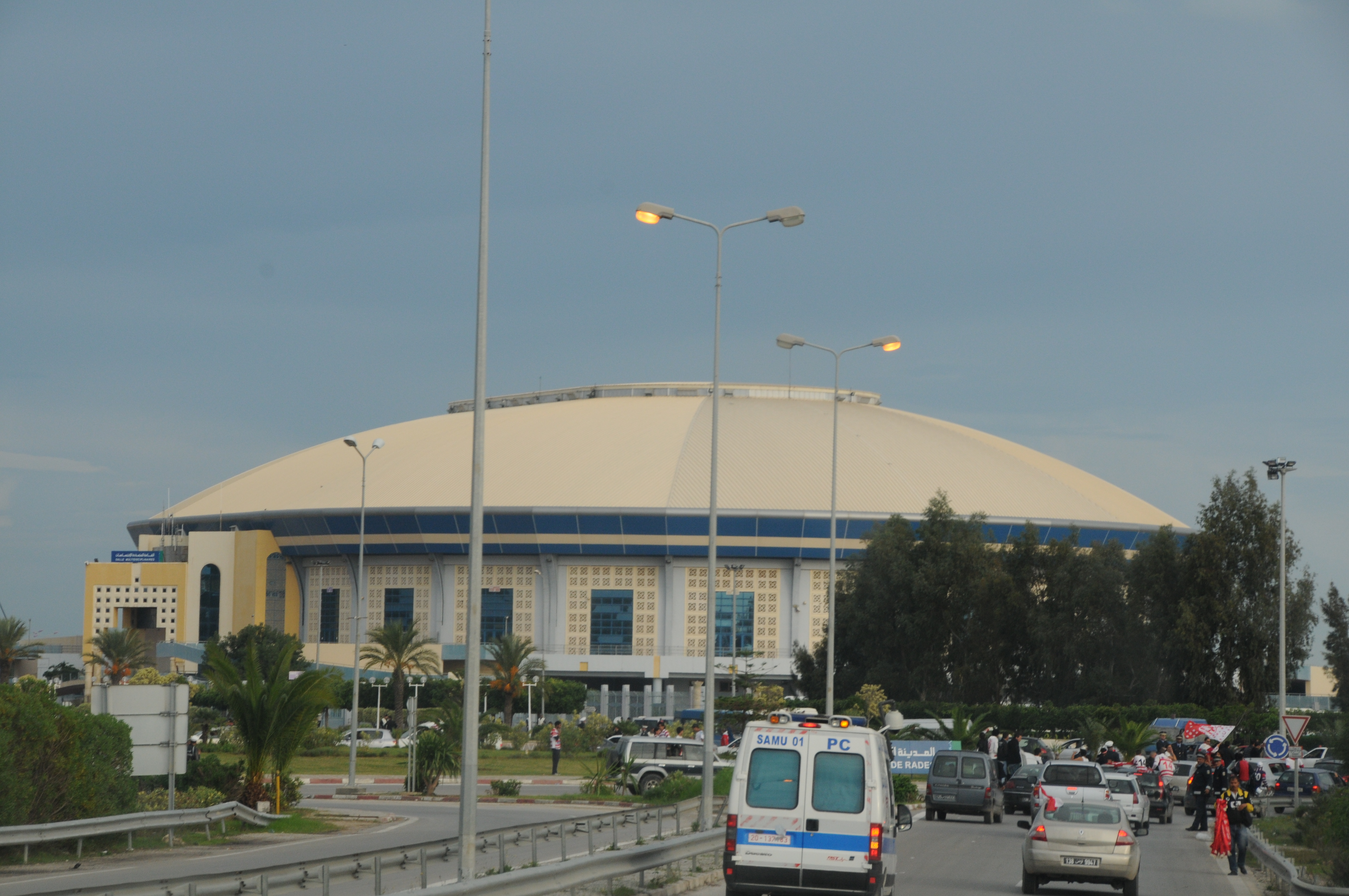 Match de Football en champion ligue entre le CA tunisien et le MAS marocain de Fès.